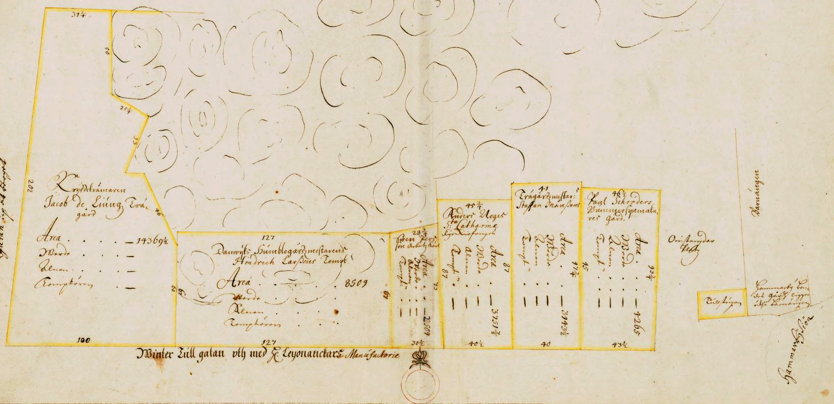 Quarteret Winter tullen den mindre (dagens "Vintertullen") enligt Holms tomtbok